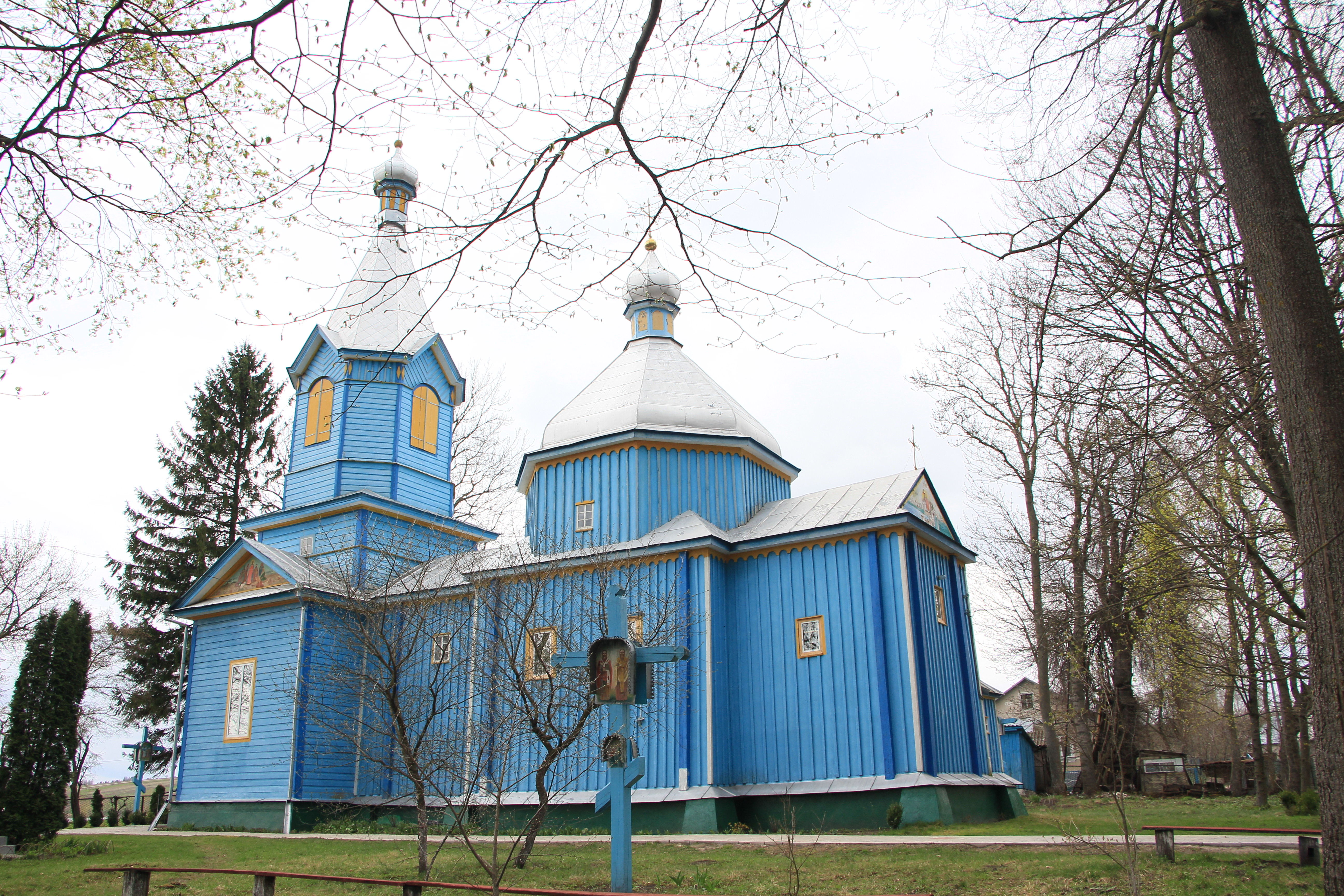 Дерев'яна церква в селі Старий Тараж Шумського району Тернопільської області